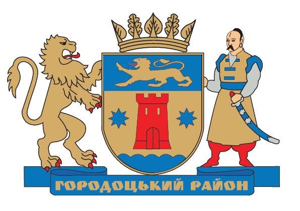 Herb rejonu gródeckiego